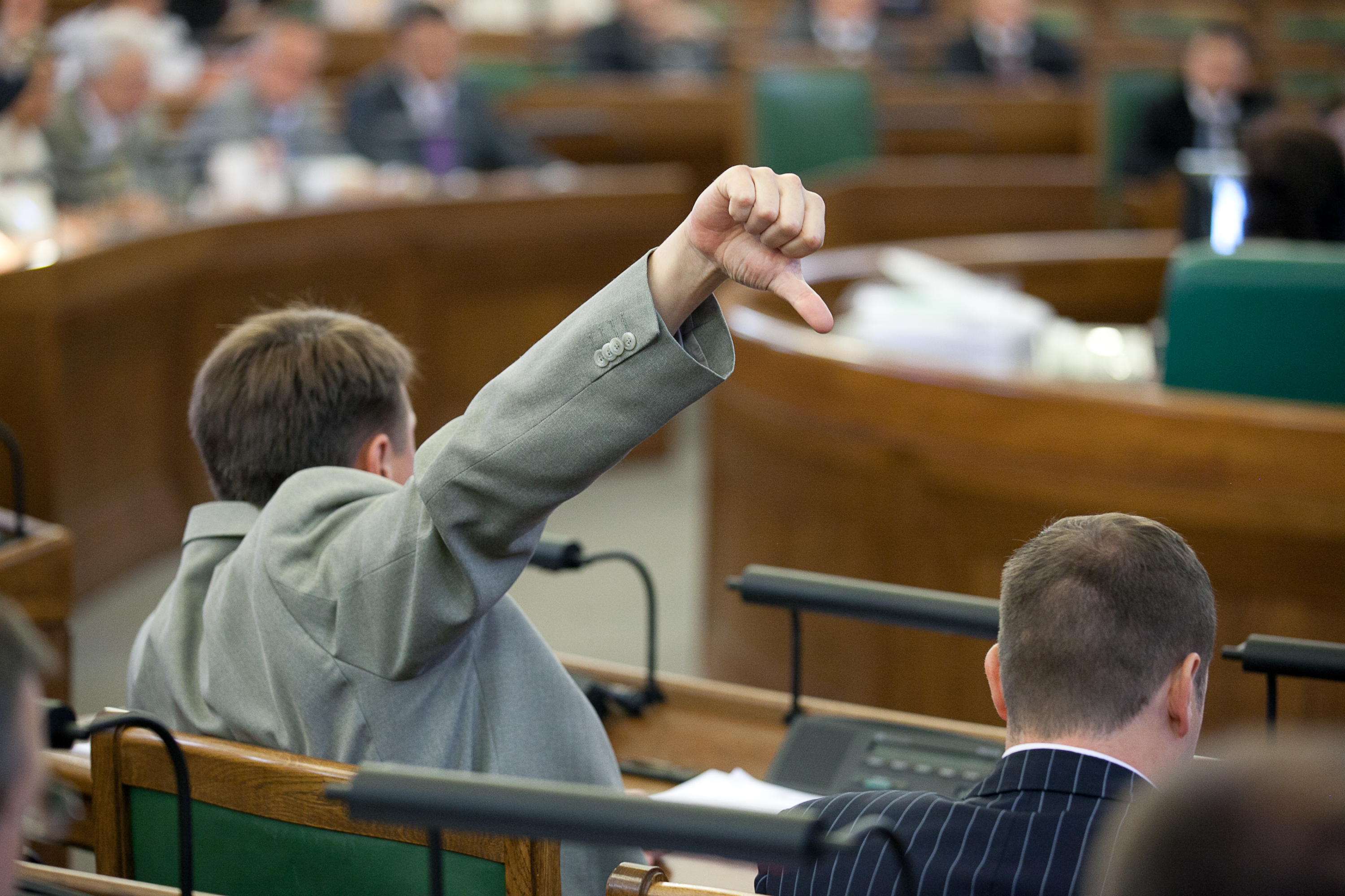 2012.gada 5.jūlijs. Saeimas 2012.gada 5.jūlija otrās ārkārtas sesijas ārkārtas sēde. Foto: Ernests Dinka, Saeimas Kanceleja